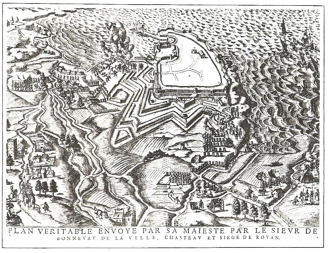 Le siège de Royan, plan de Bonneveau (1623)